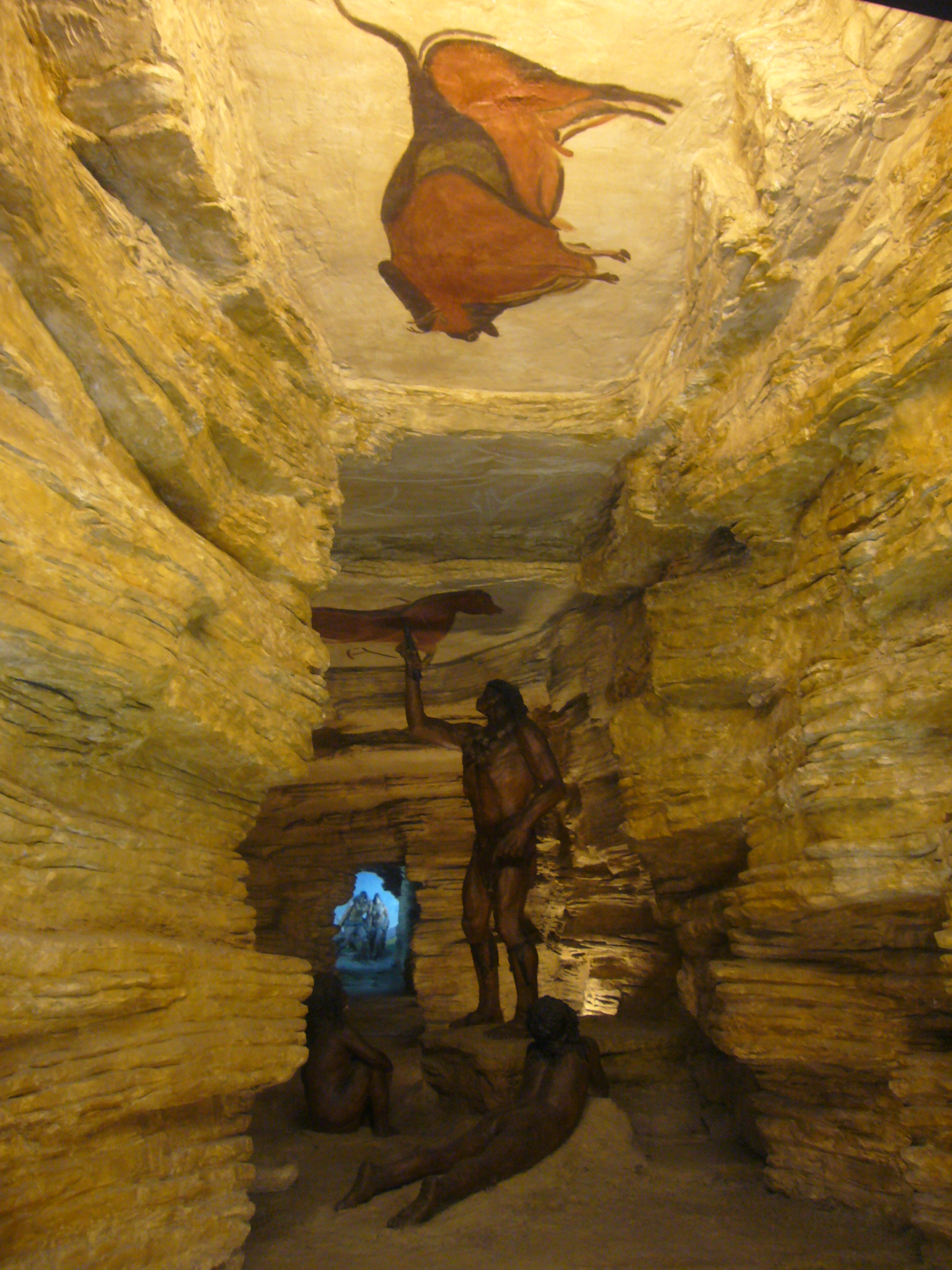 Diorama de la Cova d'Altamira, obra de l'escultor Josep Font. Formà part de l'exposició organitzada per Pere Bosch i Gimpera al soterrani del Palau Nacional amb motiu de l'Exposició internacional de Barcelona de 1929. Actualment exposada al Museu d'Arqueologia de Catalunya (Barcelona)